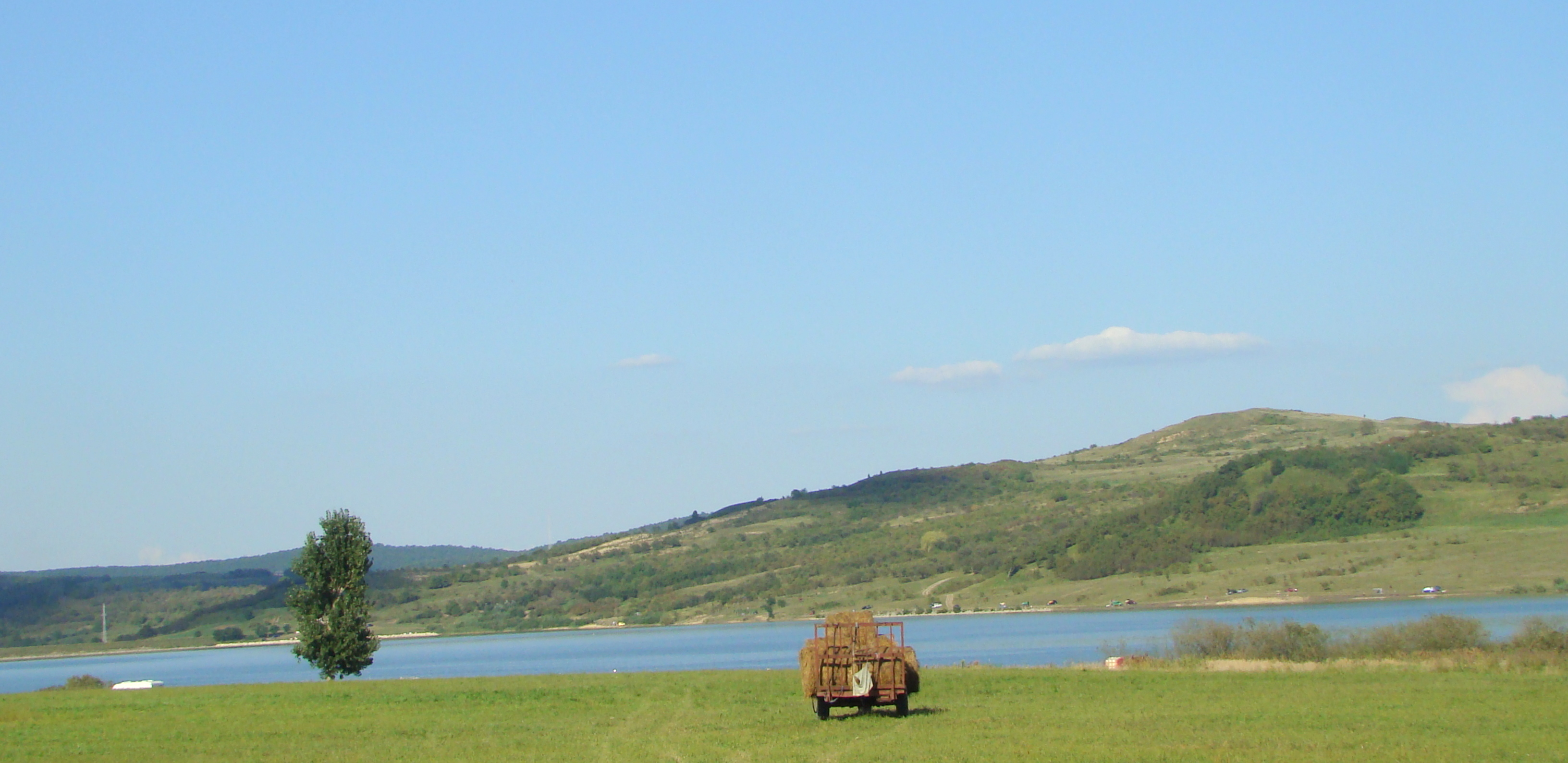 Lacul de acumulare Vârşolţ